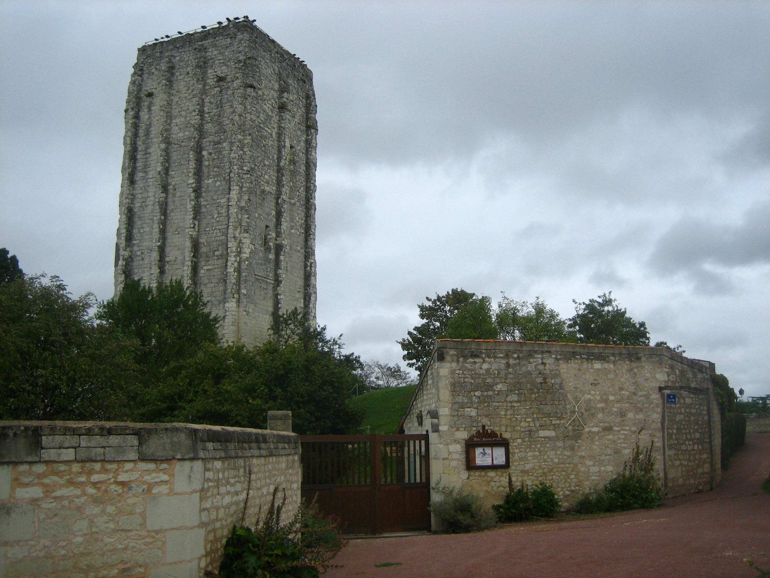 Monument du XIème siècle. .